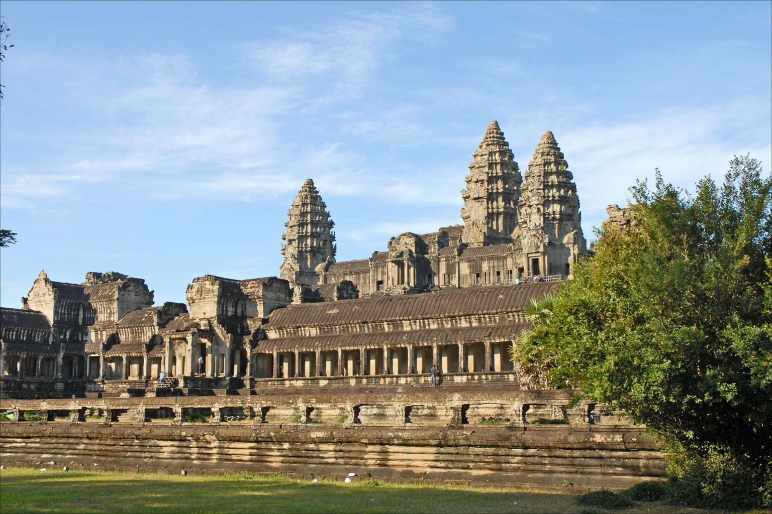 Angkor Vat est un temple d'Etat construit au XIIè siècle par le roi Suryavarman II. Il est dédié au Dieu Vishnu. Il constitue l'apogée de l'art khmer. Angkor Vat signifie "capitale monastère". C'est le monument le mieux conservé de tous les monuments khmers en raison de son occupation par des religieux depuis sa redécouverte au XVIè siècle.